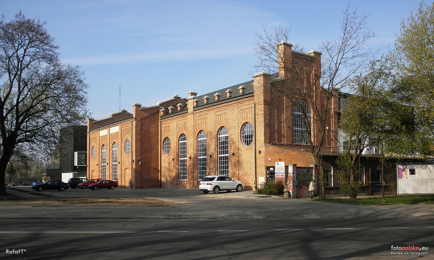 Budynek dawnej elektrowni zaadaptowany na centrum sztuki.